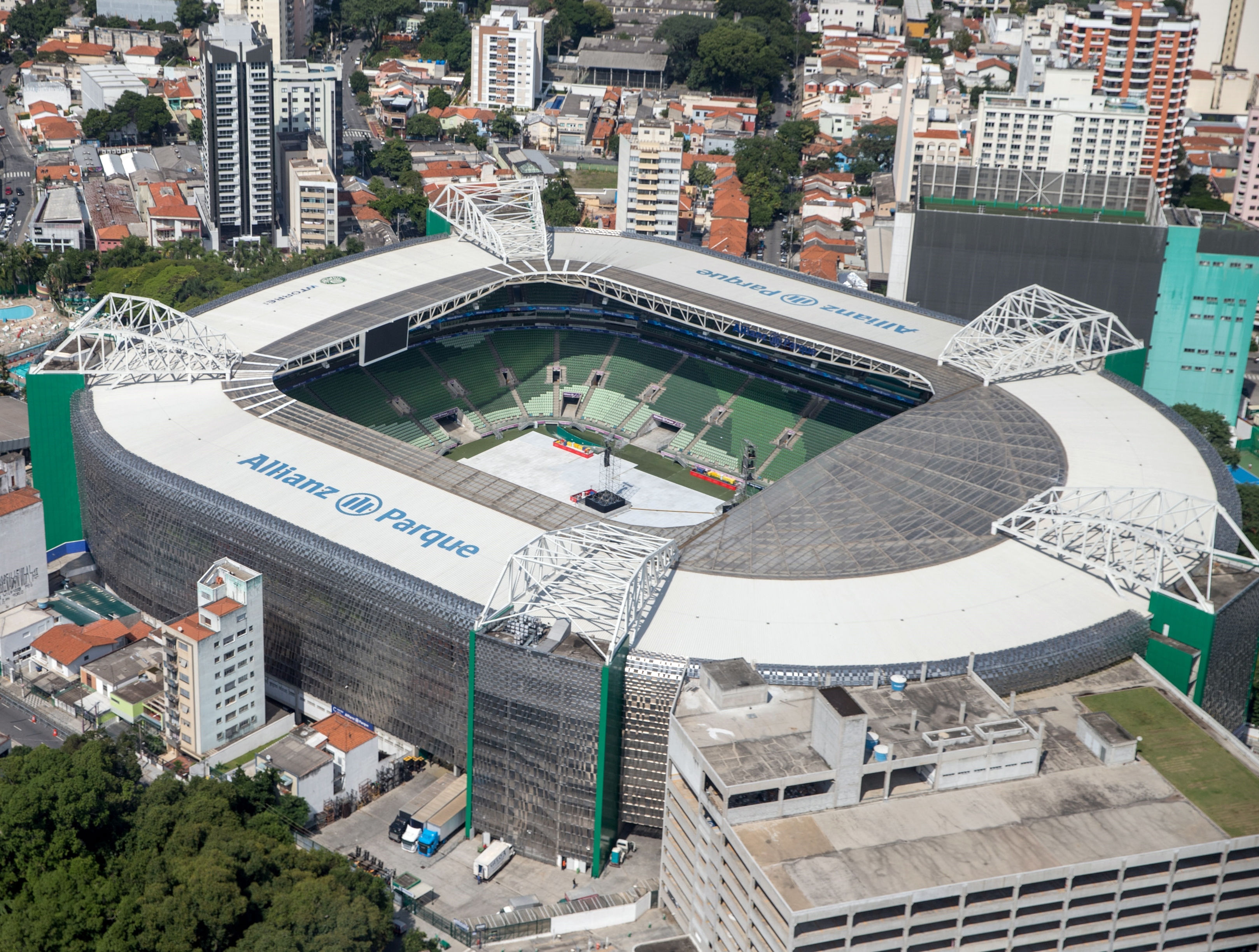 Imagens da Cidade de São Paulo e Zoológico da Capital Paulista. Local: São Paulo/SP. Data: 27/03/2019. Foto: Governo do Estado de São Paulo